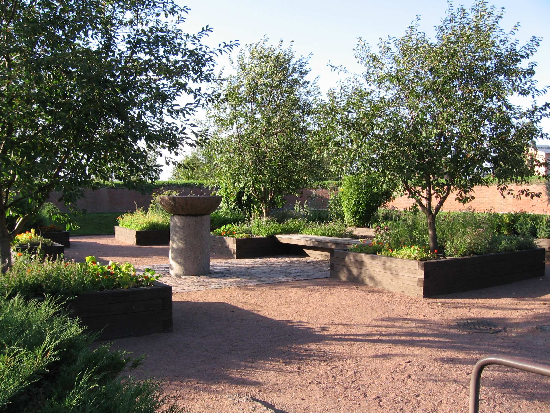 Ruotsinsalmen merilinnoitukseen kuuluneeseen pieneen linnoitusrakenteeseen, Redutti Kotkaan, perustettu yrttipuutarha Kotkassa.